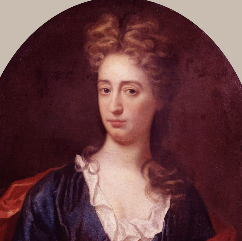 Baronessa Abigail Masham